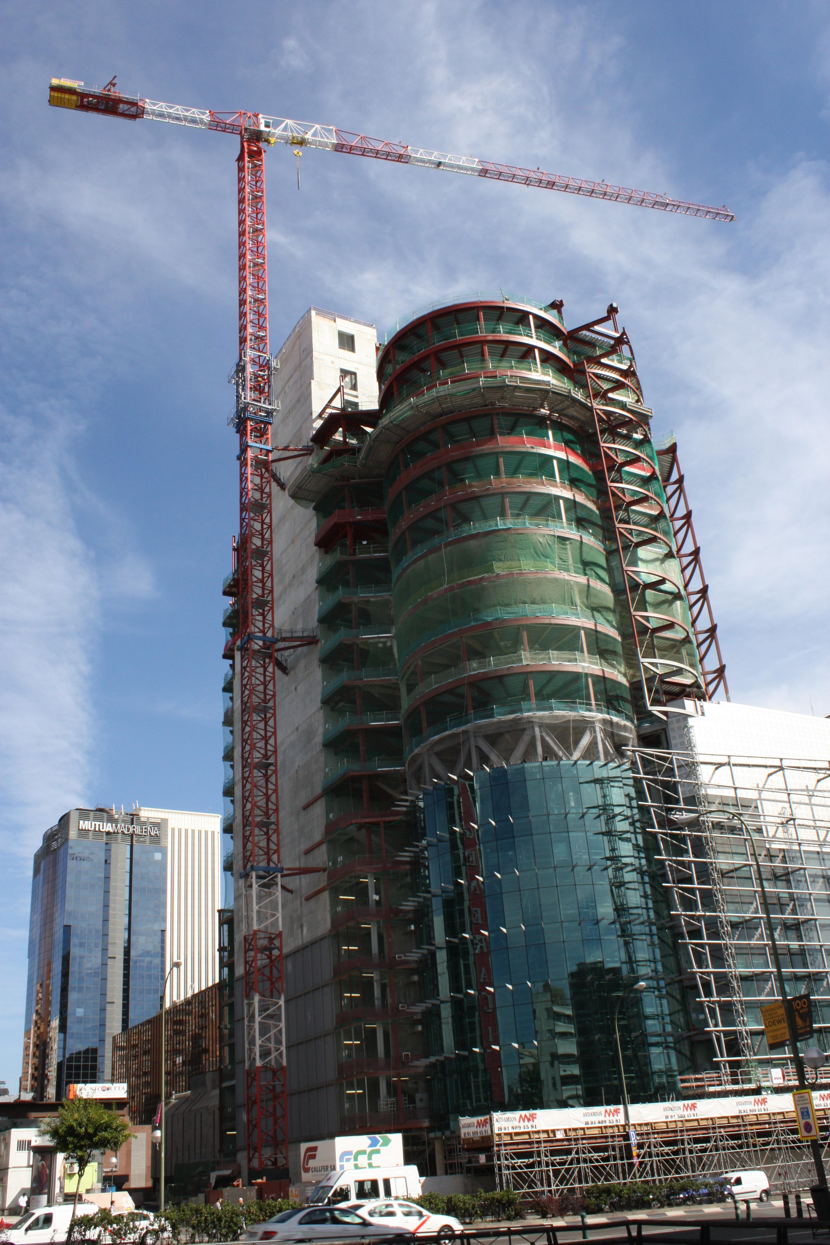 Grua torre de la compañia GRUAS Y MAQUINARIA, S.A. - GRUYMSA instalada en las proximidades del Paseo de la castellana en Madrid, para la construcción del antiguo edificio Windsor.